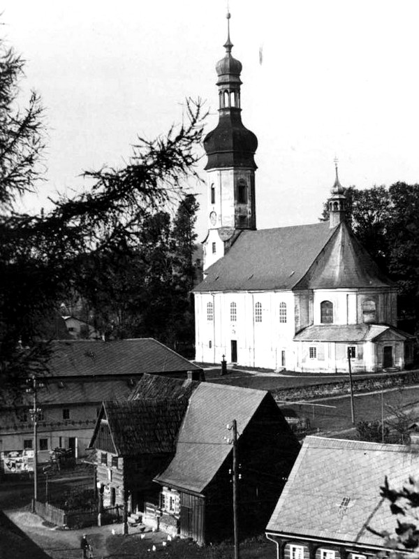 Dobový snímek kostela svatého Martina ve Brtníkách